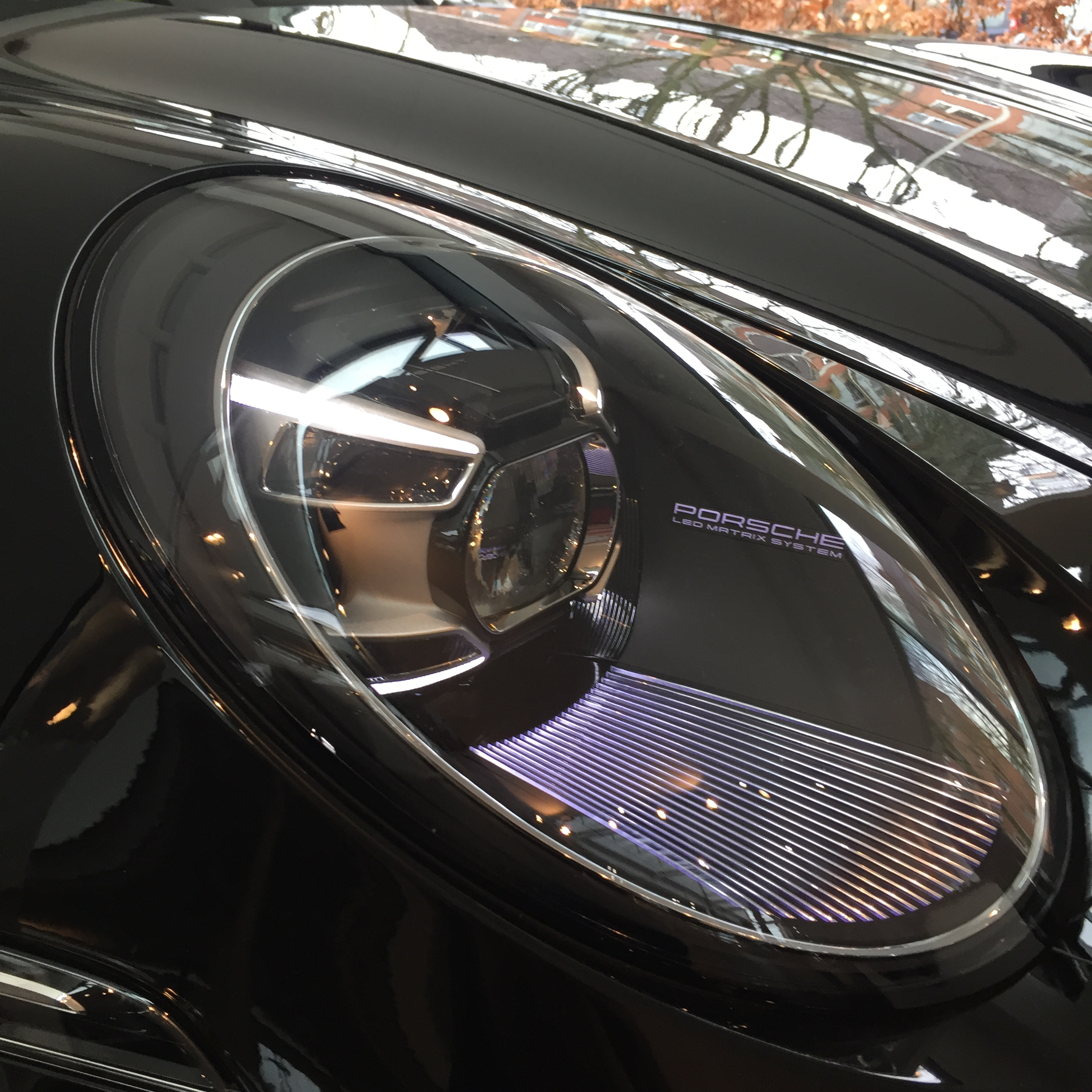 Porsche 911 (992) Scheinwerfer LED Matrix System